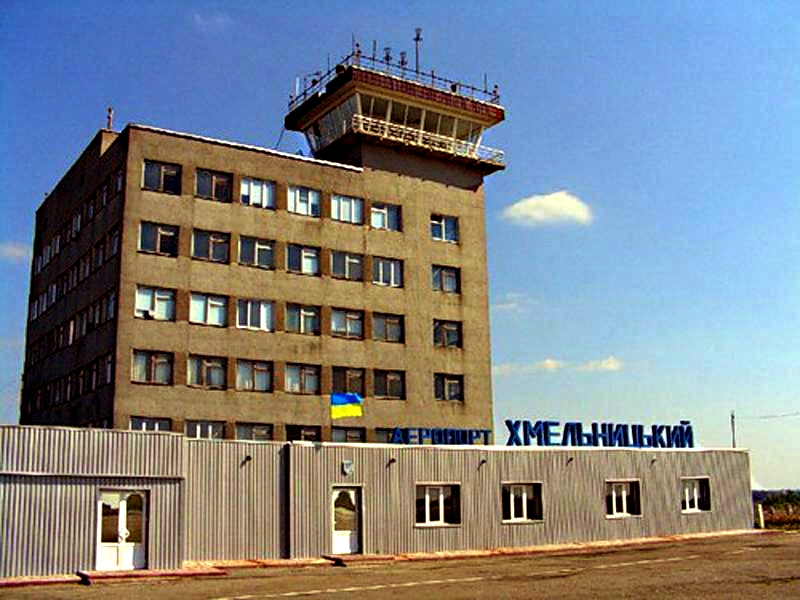 Аеропорт Хмельницький